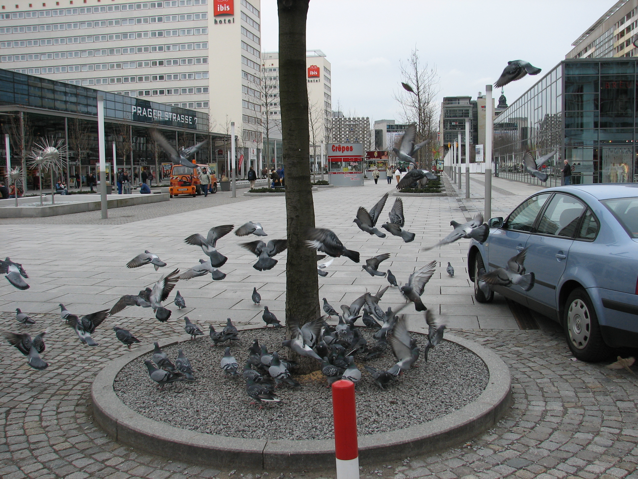 Stadttauben